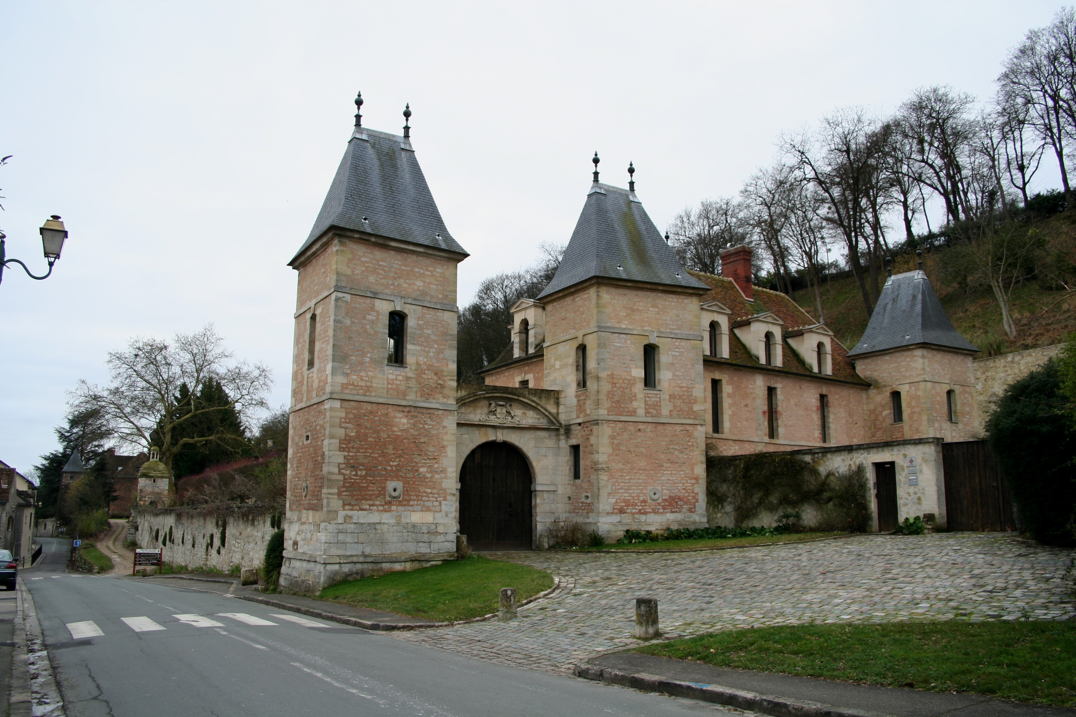 Château de Médan - Yvelines (France).